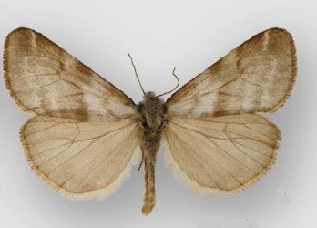 Dodia tarandus